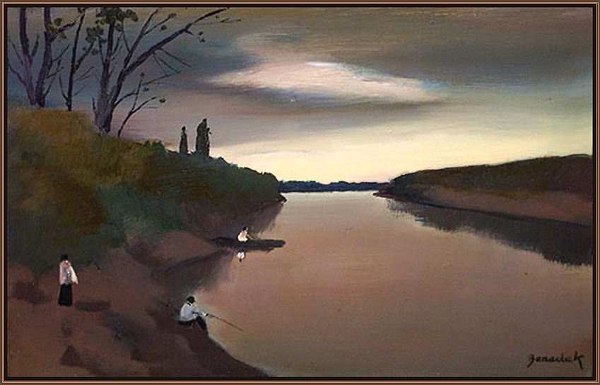 Idősebb Benedek Jenő (Kecskemét, 1906. január 16. – Budapest, 1987. július 19.) magyar festő Tisza című olajfestménye, kb. 1983 - 40x60 cm